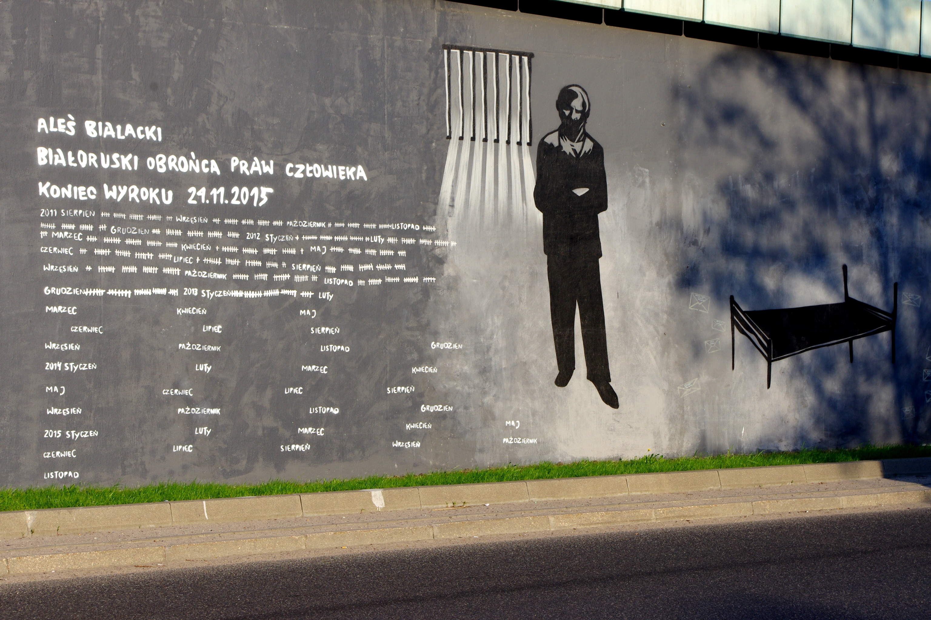 Mural "Kalendarze empati" na ścianie przy skrzyżowaniu ulicy Górczewskiej i Alei Prymasa Tysiąclecia w Warszawie, prezentujący osoby uznane przez Amnesty International za tzw. więźniów sumienia